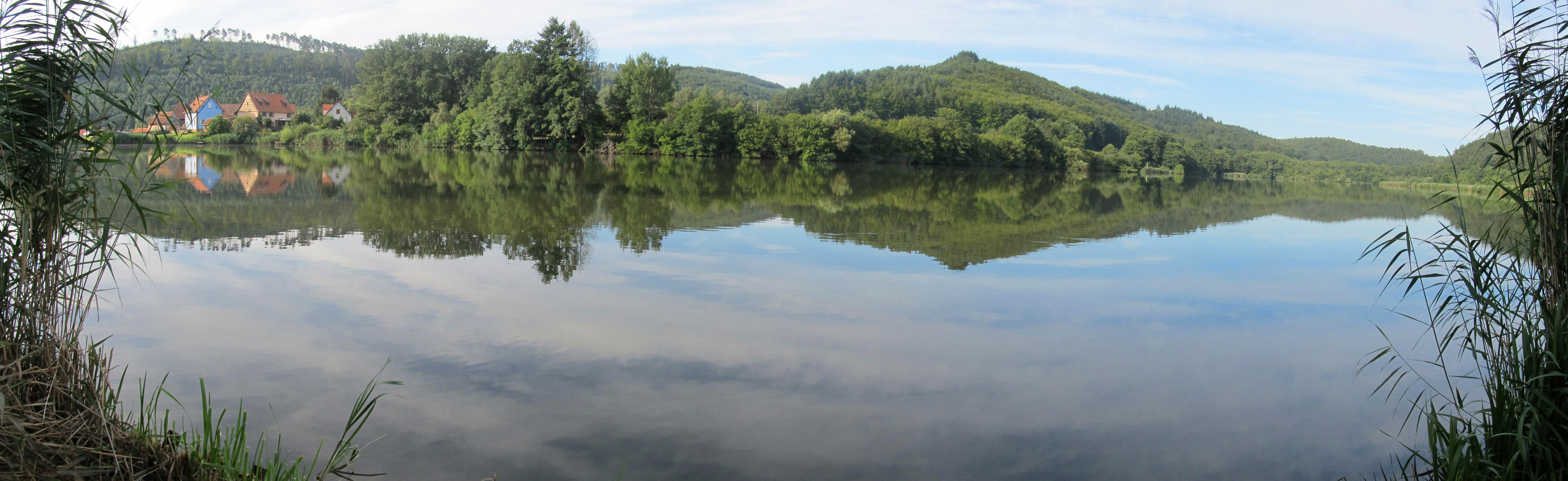 Baerenthal: l'étang